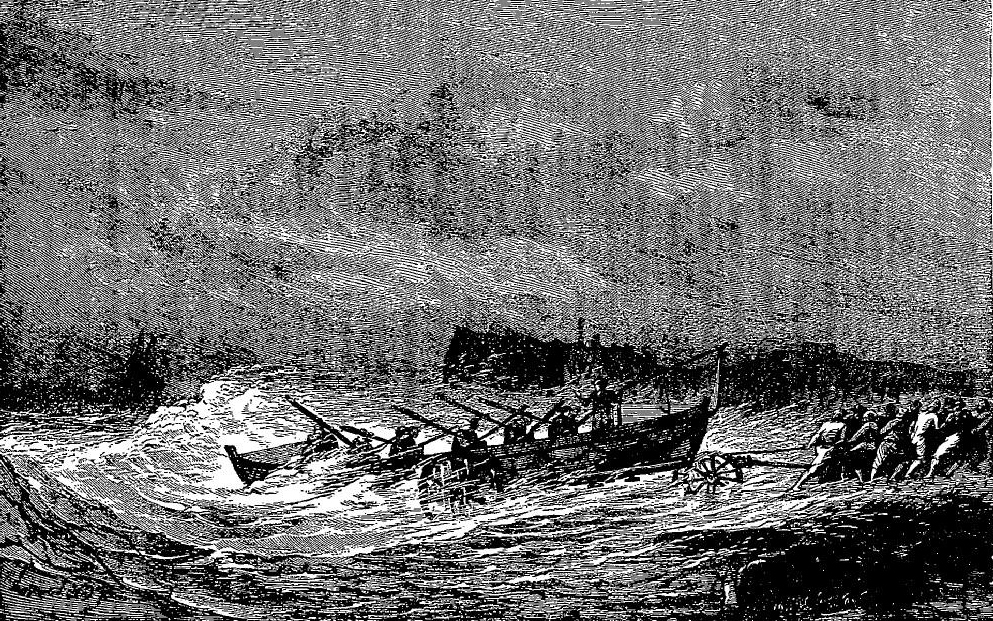 Canot de sauvetage de la "Société centrale de sauvetage" allant au secours de naufragés (dessin anonyme paru dans les Annales de la Société centrale de sauvetage en 1897)